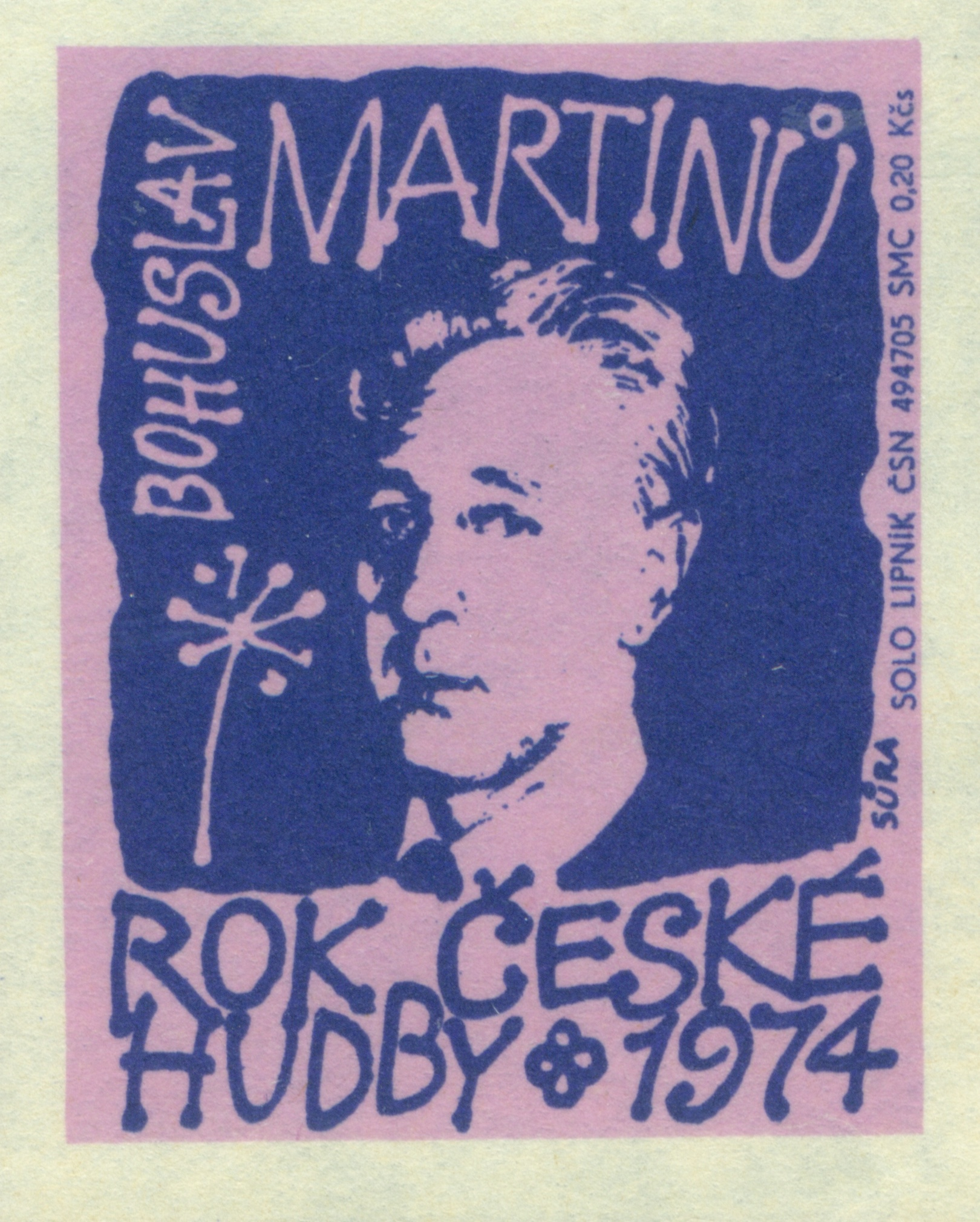 nálepka z roku 1974